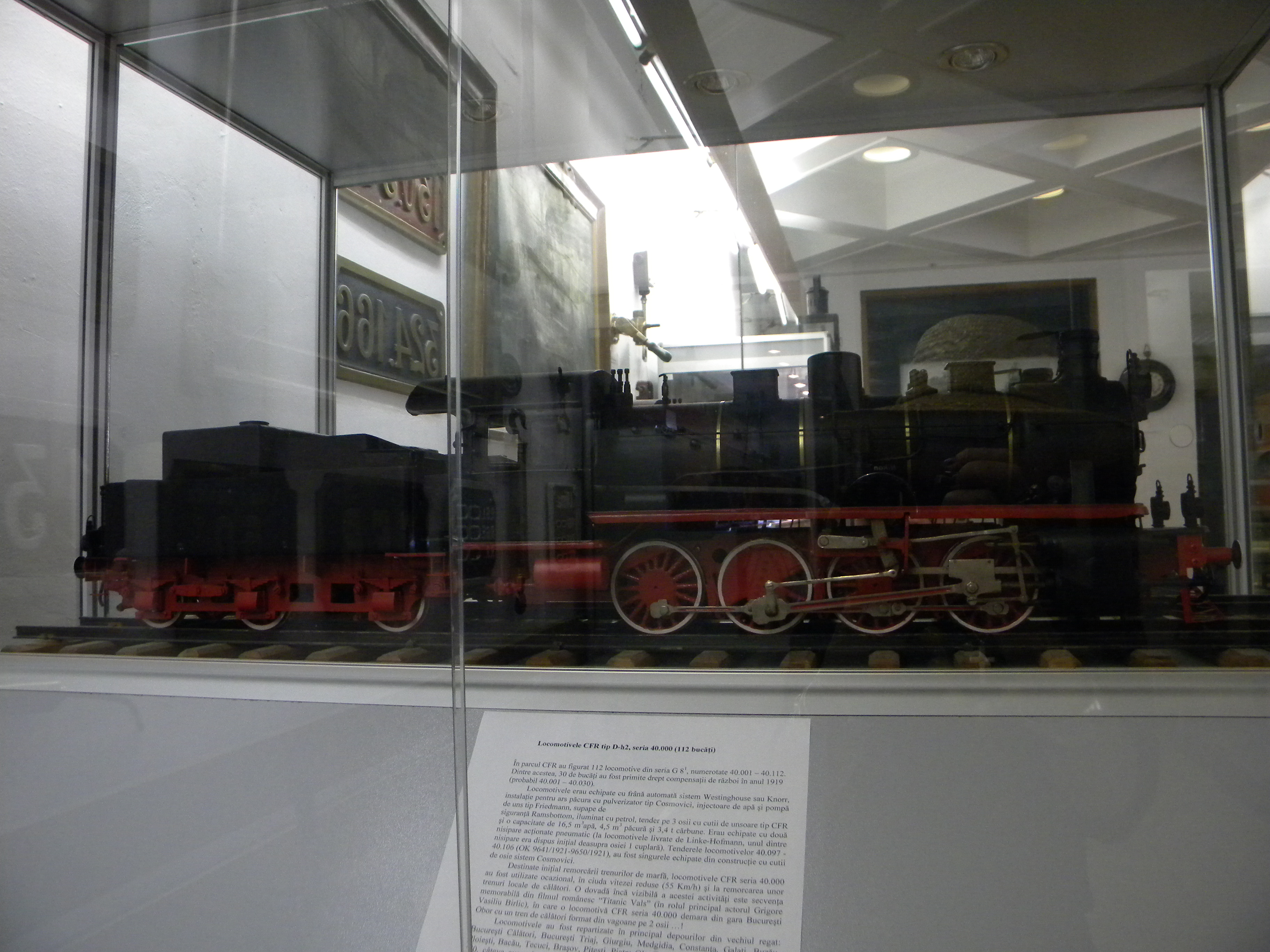 Bucuresti, Romania, Muzeul CFR (In incinta GARII DE NORD) (macheta)(1)(B-II-m-B-18803)